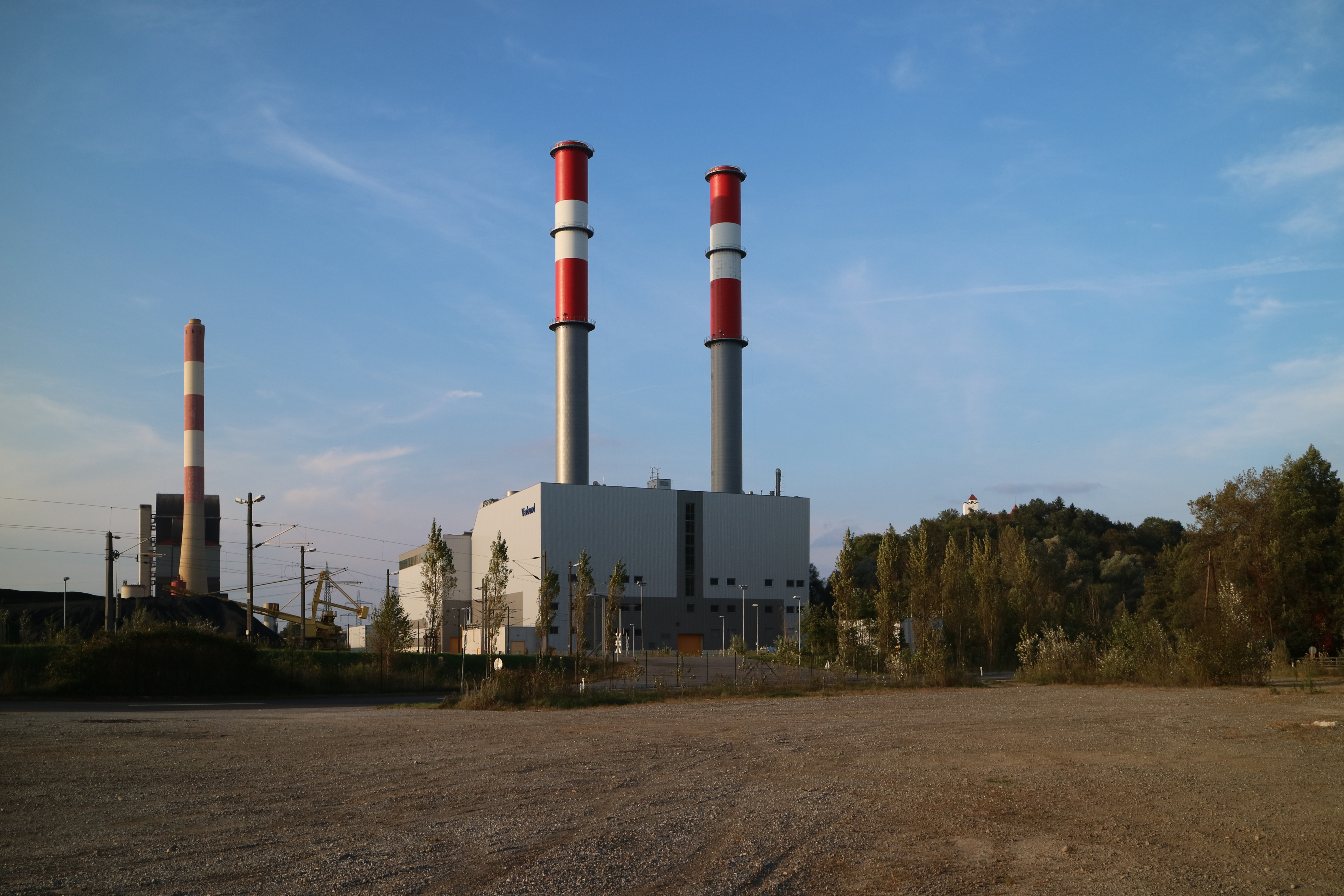 Gas- und Dampfkraftwerk Mellach